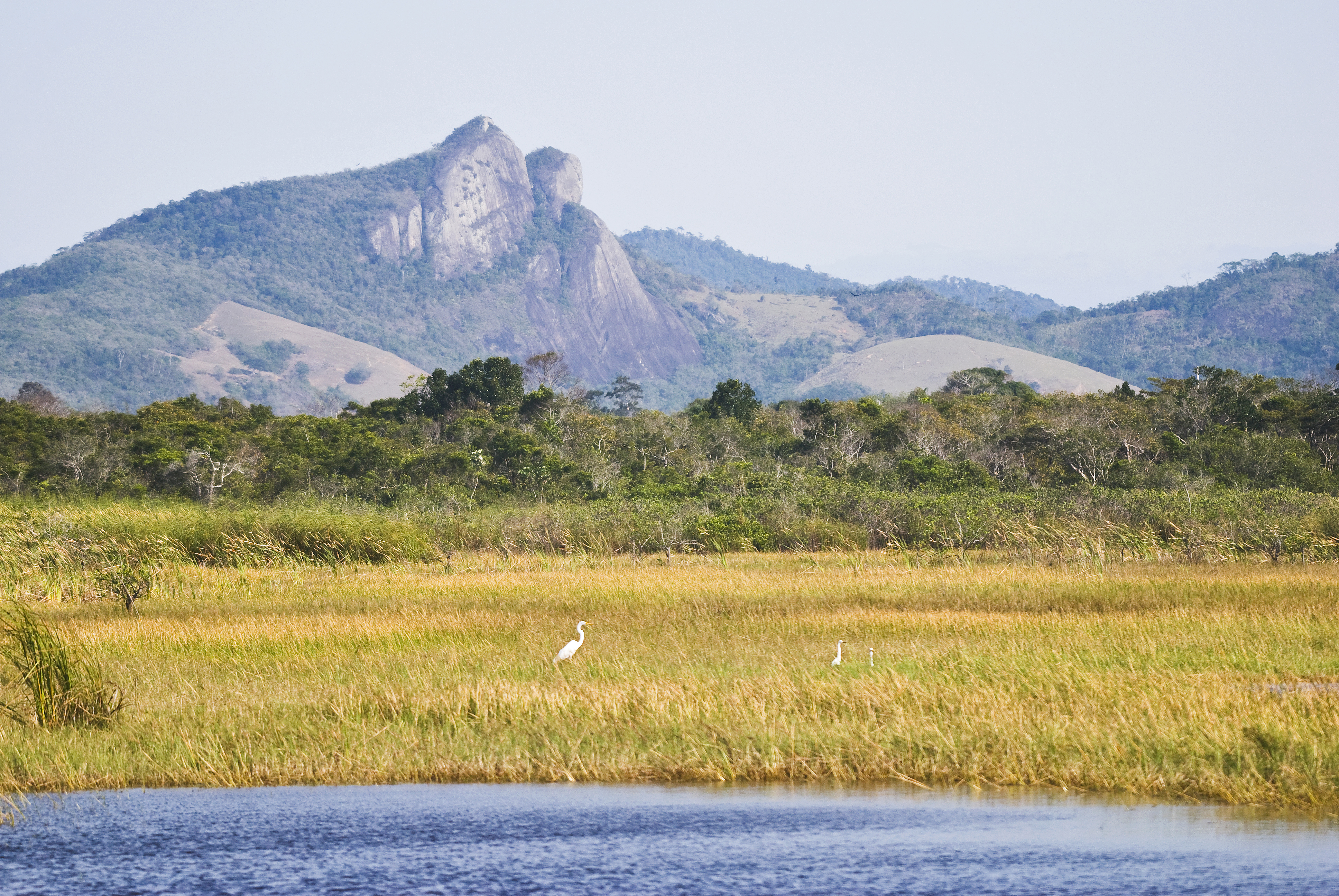 Capim dourado, no Parque Estadual Paulo César Vinha.